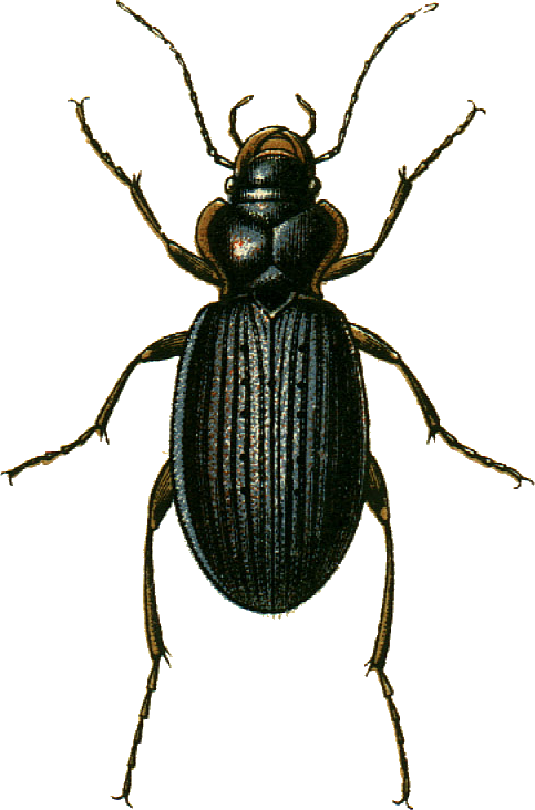 This file has been extracted from another file: Jacobs08.jpg